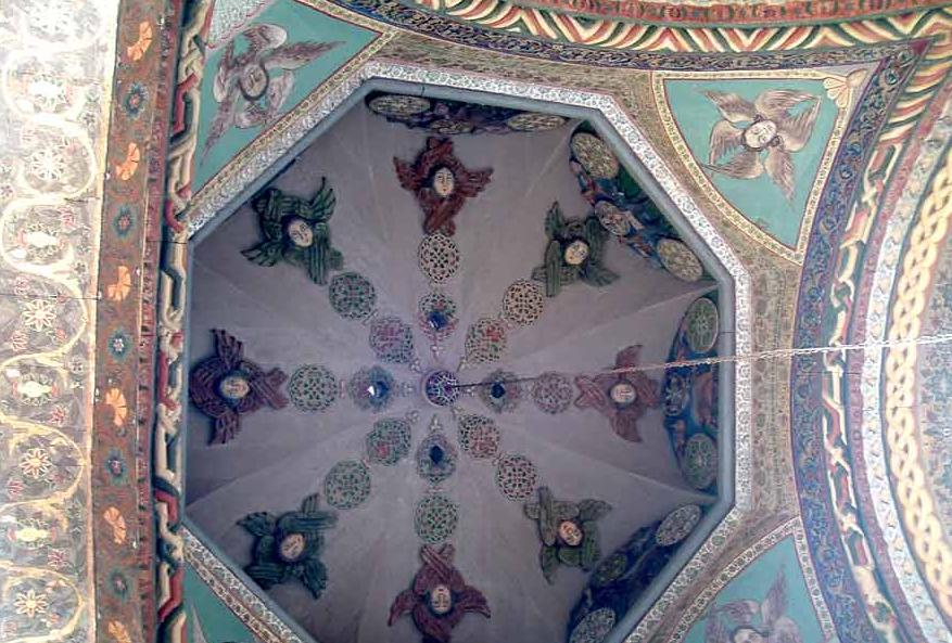 роспись в соборе Этчмиадзина